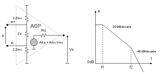 Modélisation d'un AOP - caractérisation dynamique (impédances d'entrée, de sortie, TRMC, Gain en fréquence) - je suis l'auteur